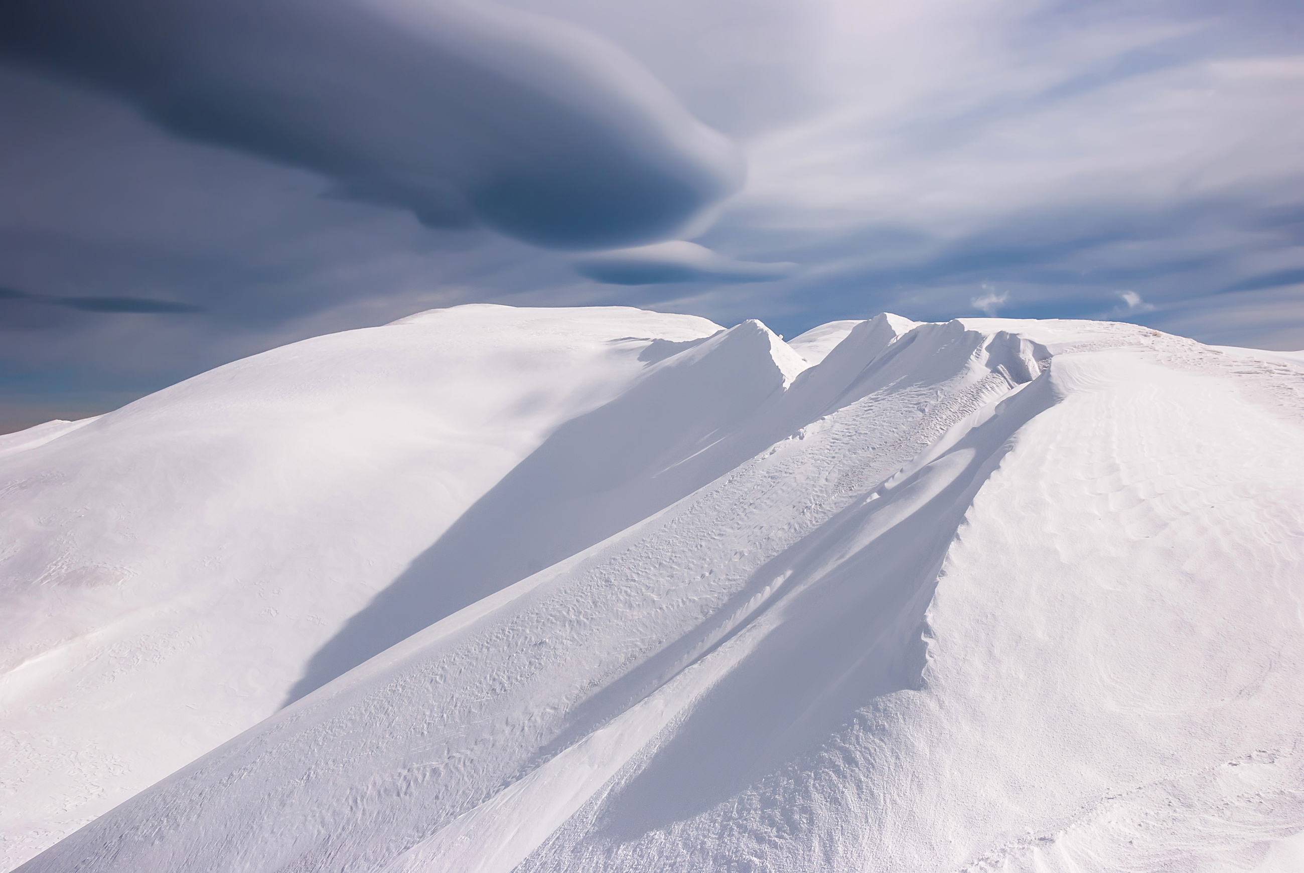 Карпатський, Яремчанська міська рада, Верховинський район, Надвірнянський район